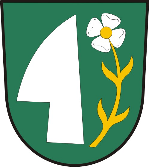 Kravsko